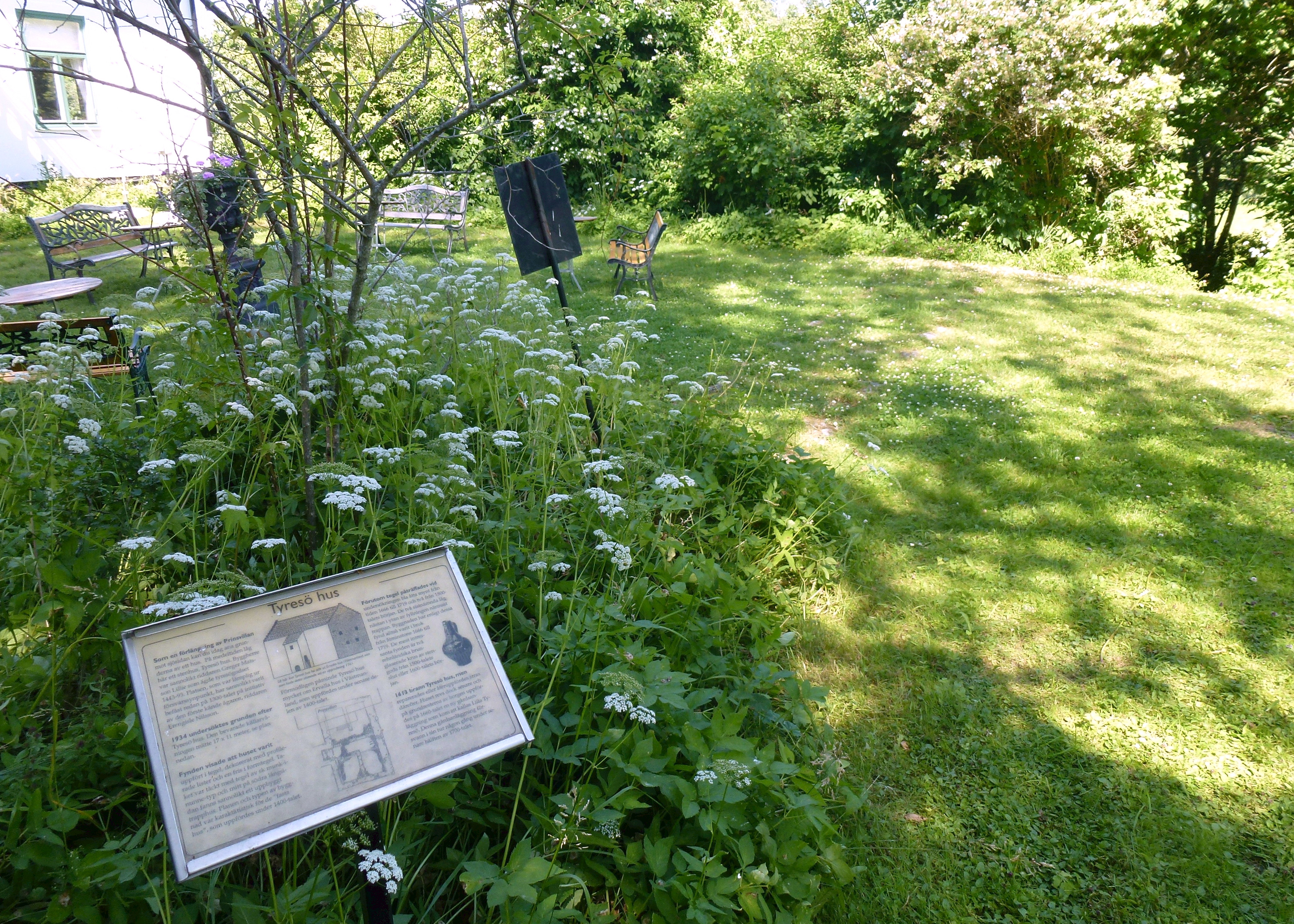 Platsen för Tyresö hus bakom Prinsvillan